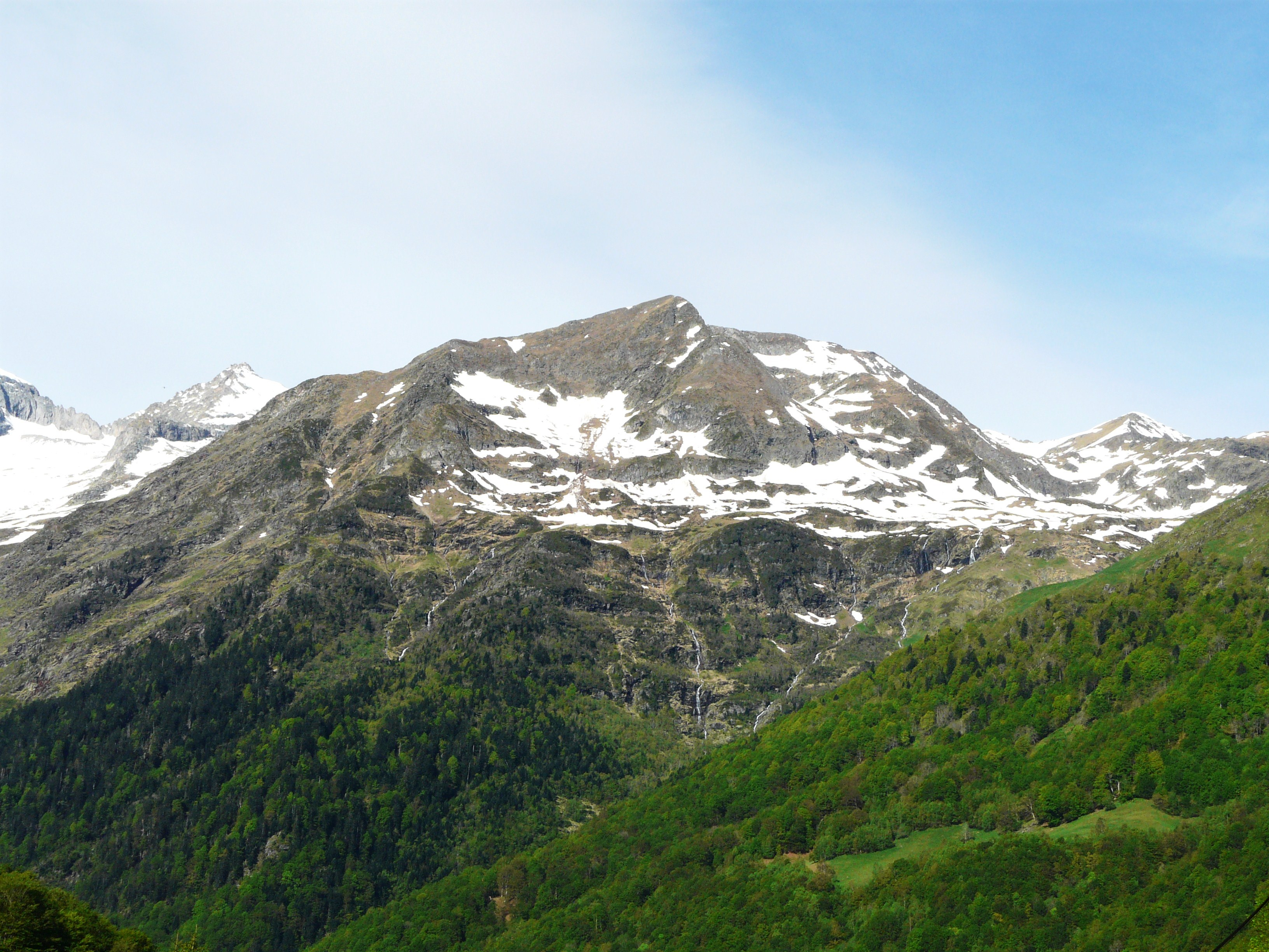 Le pic des Crabioules marque la limite les communes de Castillon-de-Larboust (à gauche) et Cazeaux-de-Larboust (à droite), Haute-Garonne, France. Au-delà du pic, c'est l'Espagne.